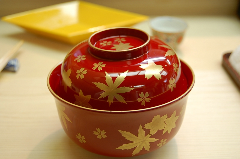 A typical bowl for Japanese soup.DSC_0387